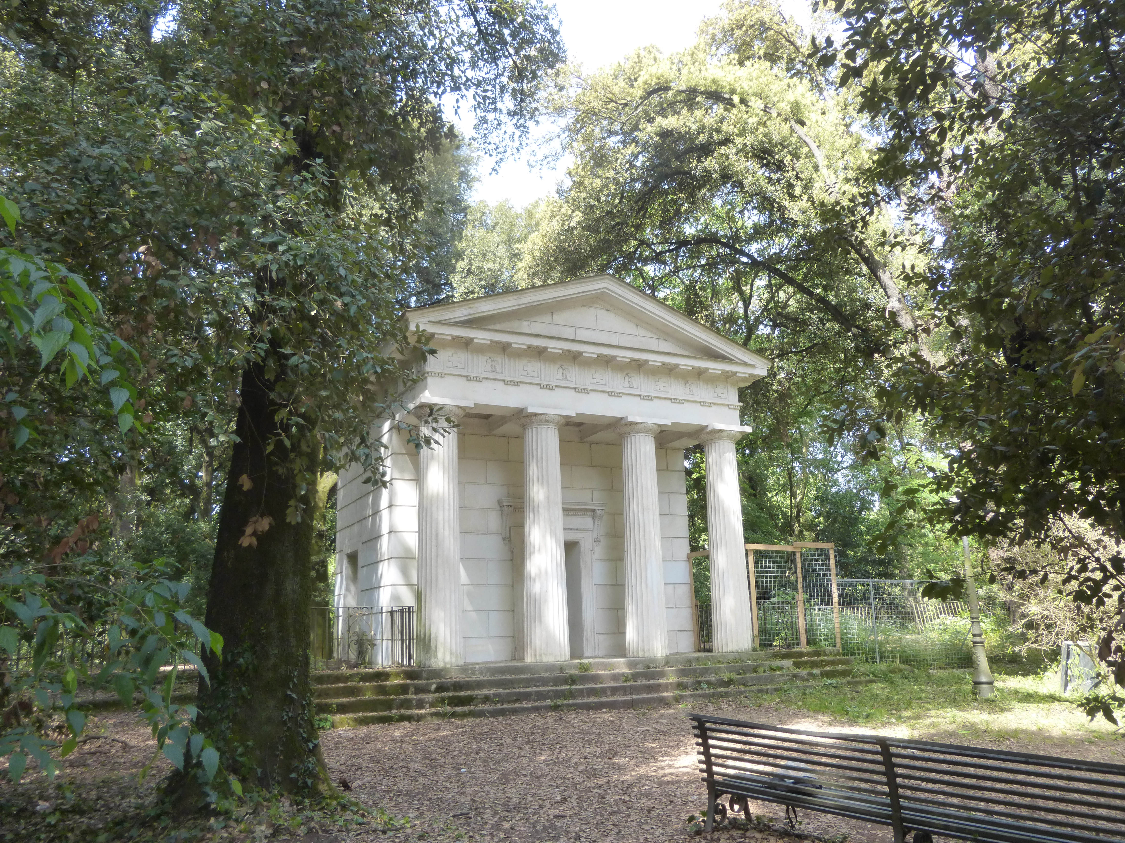 Roma, Villa Ada, Tempio di Flora, prospetto